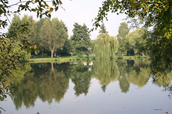 Der Grouvener Weiher